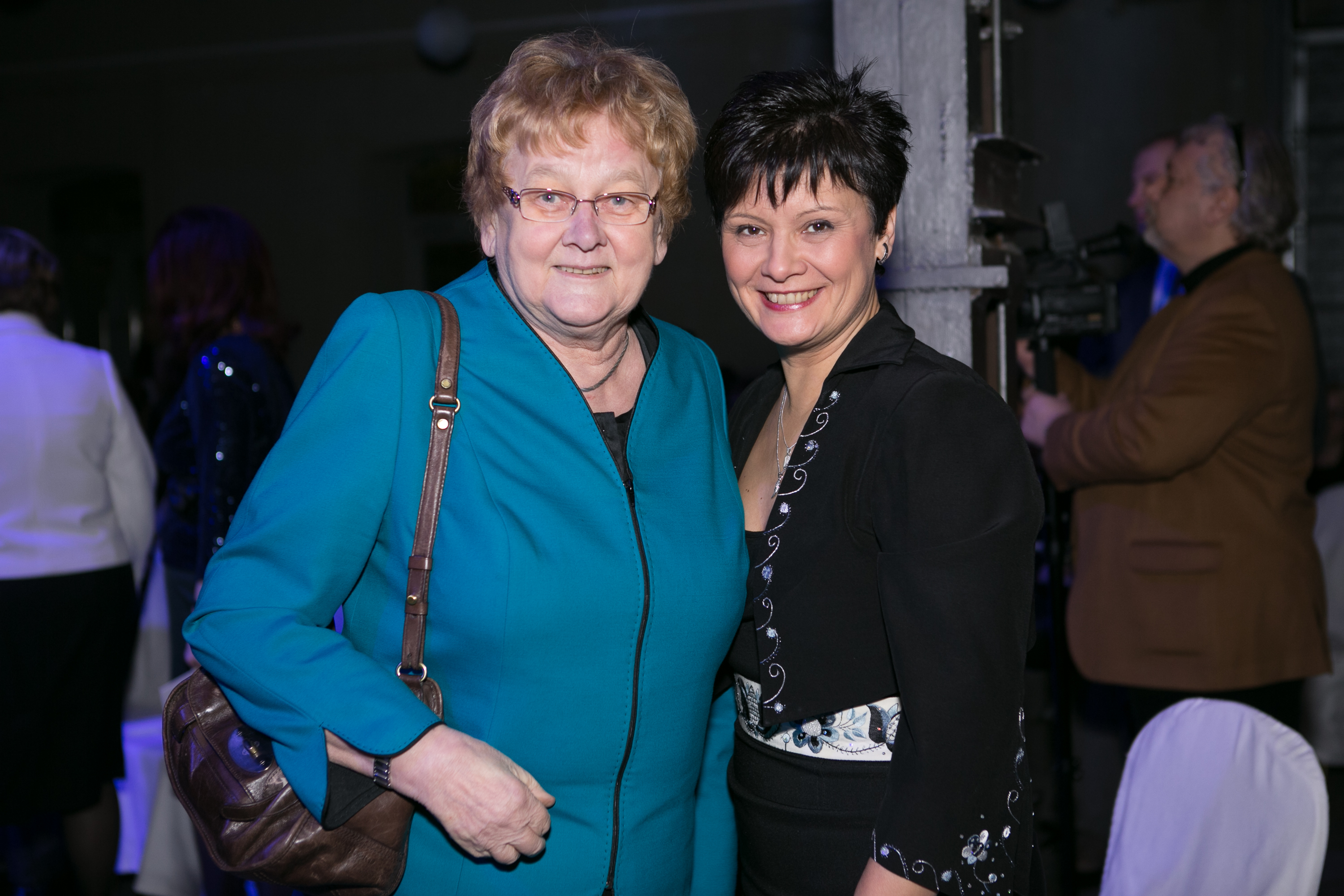 2013.gada 28.novembris. Saeimas deputāti piedalās Baltijas Asamblejas balvas pasniegšanas ceremonijā. Foto: Ernests Dinka, Saeimas Kanceleja Izmantošanas noteikumi: saeima.lv/lv/autortiesibas